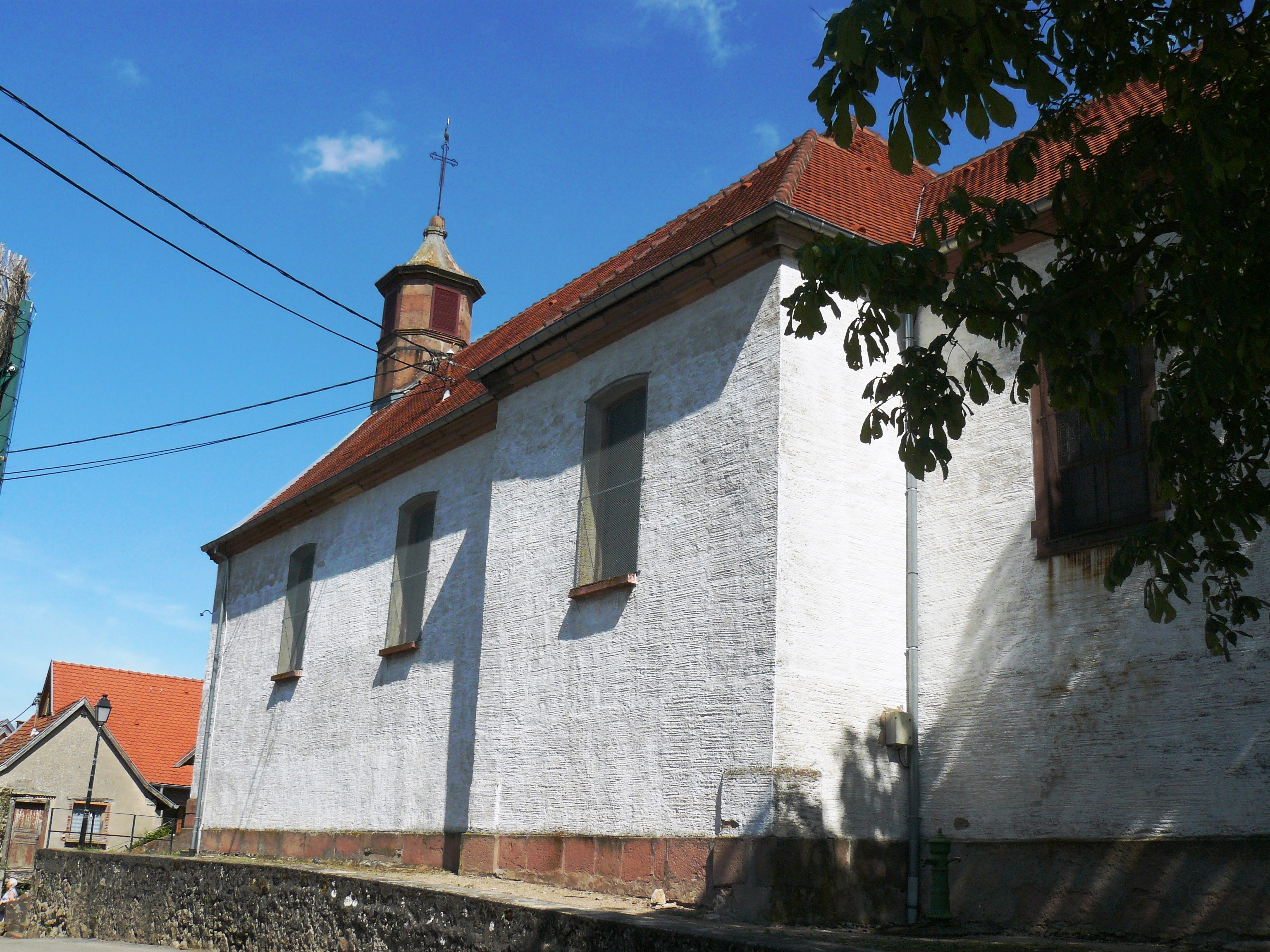 Église Saint Michel